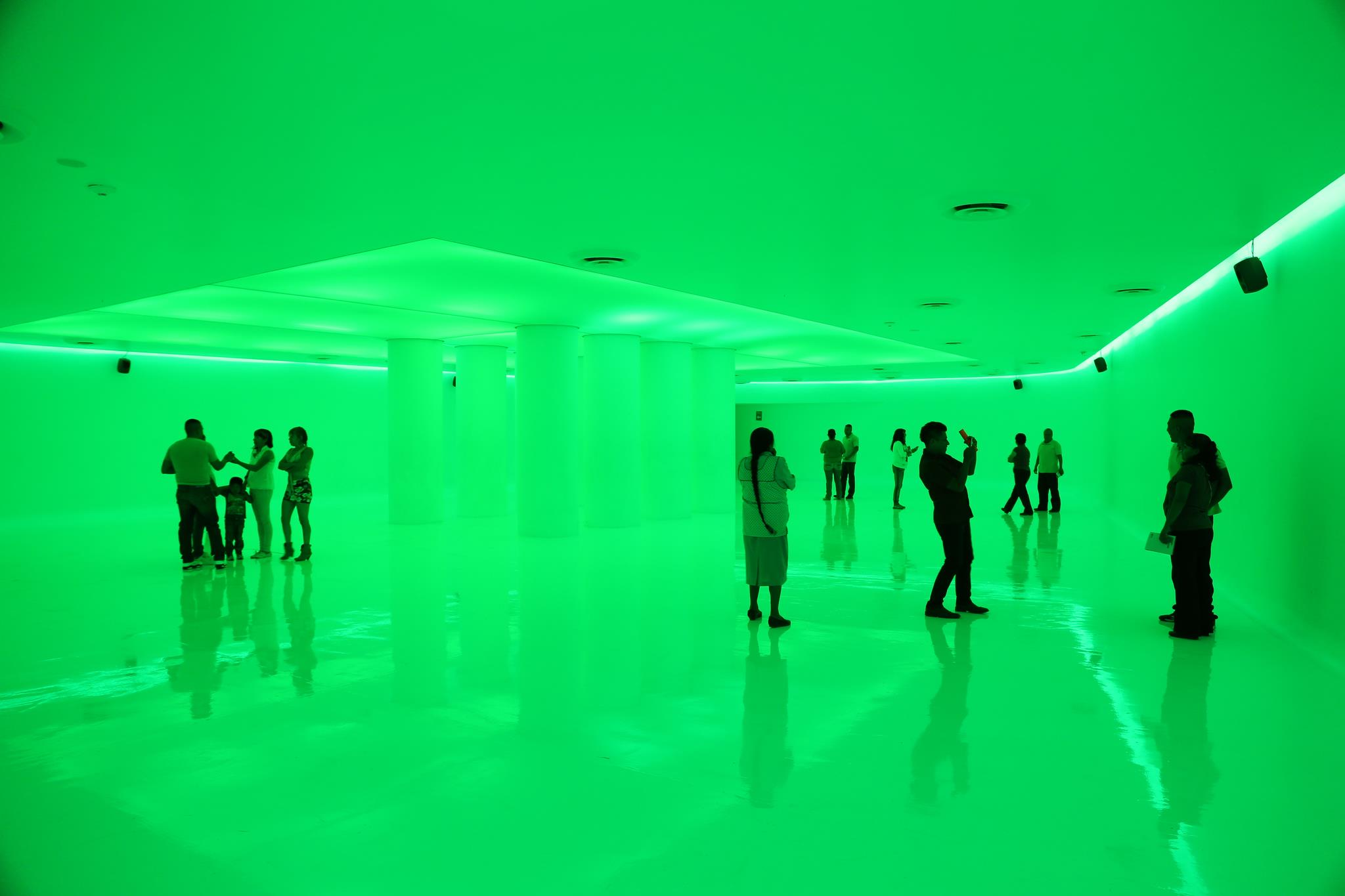 la memoria como experiencia de inmersión